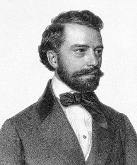 Degré_Alajos